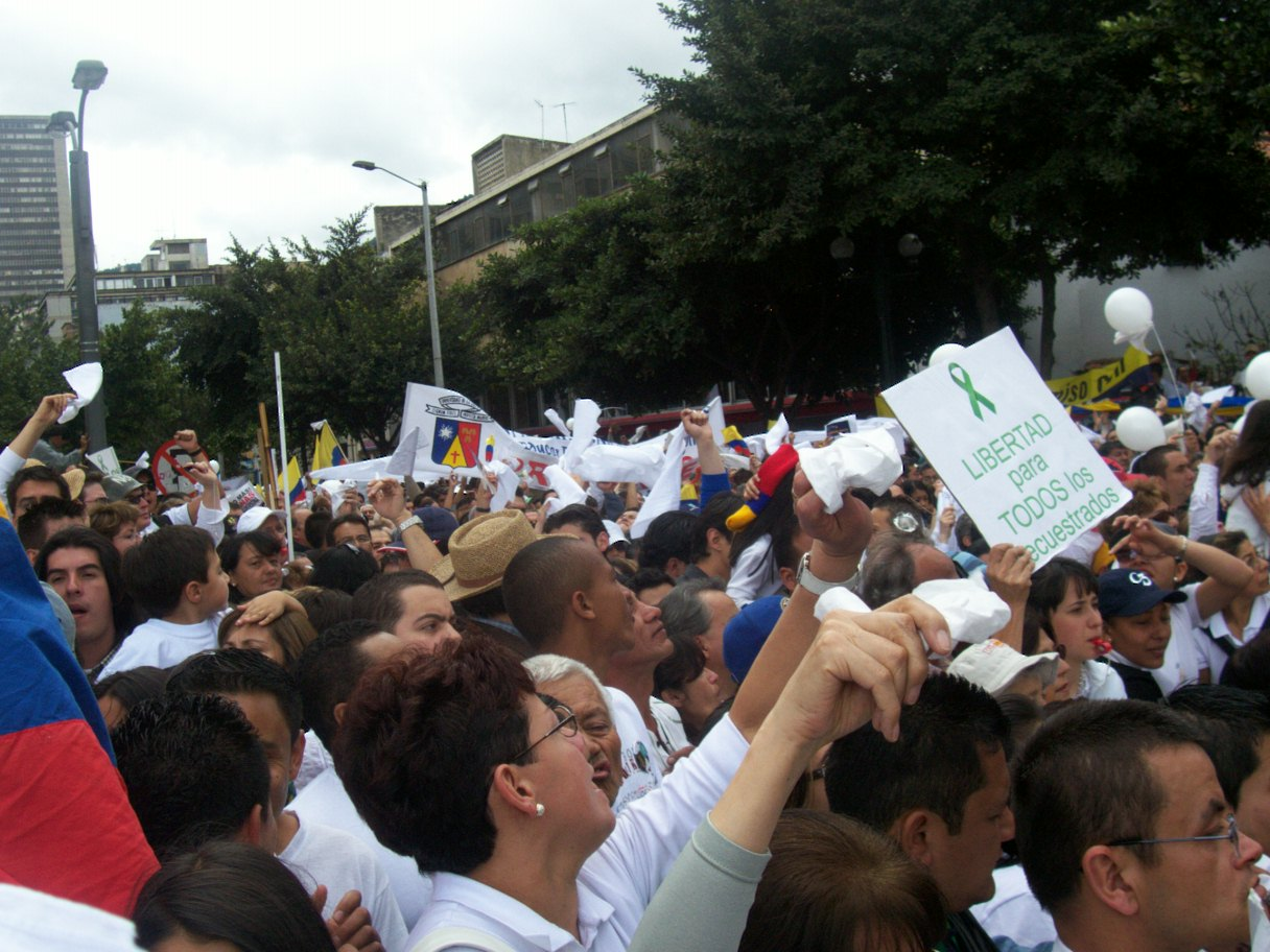 Marcha por la paz el 5 de julio de 2007, Bogotá Colombia